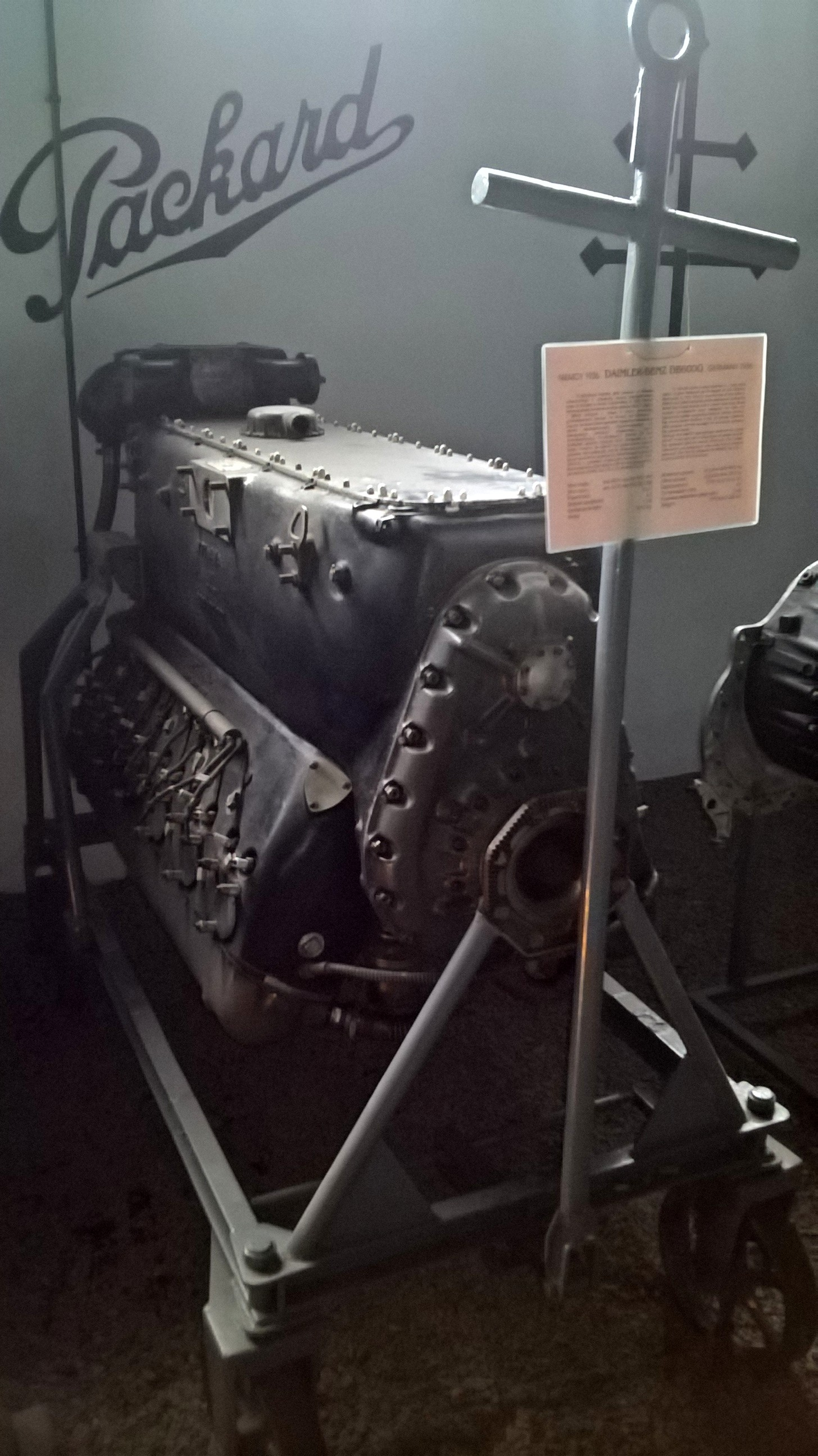 Niemiecki 12-cylindrowy silnik widlasty Daimler-Benz DB 600 z 1935 r. ze zbiorów Muzeum Lotnictwa Polskiego w Krakowie.